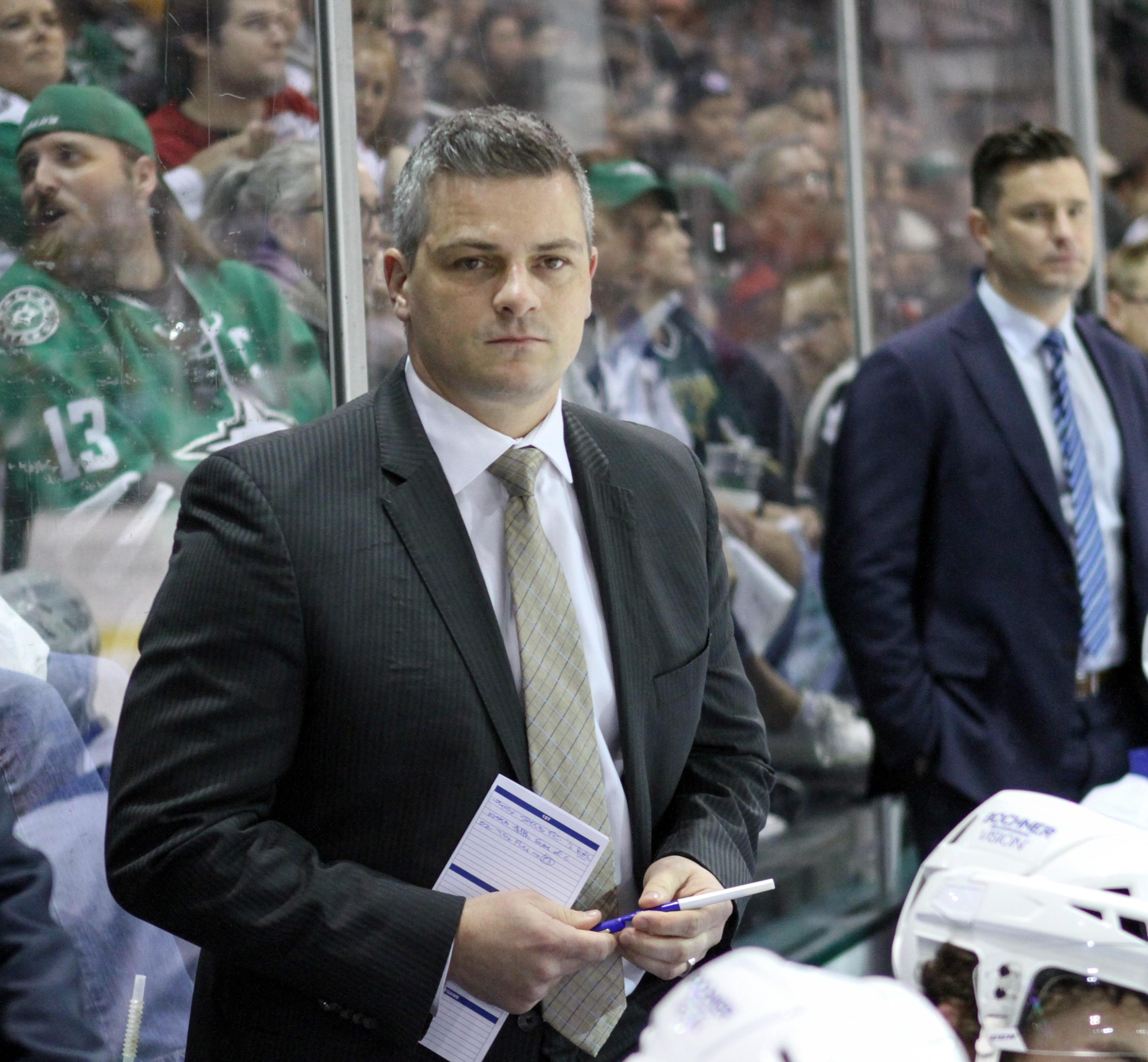 Photo: Andy Nietupski